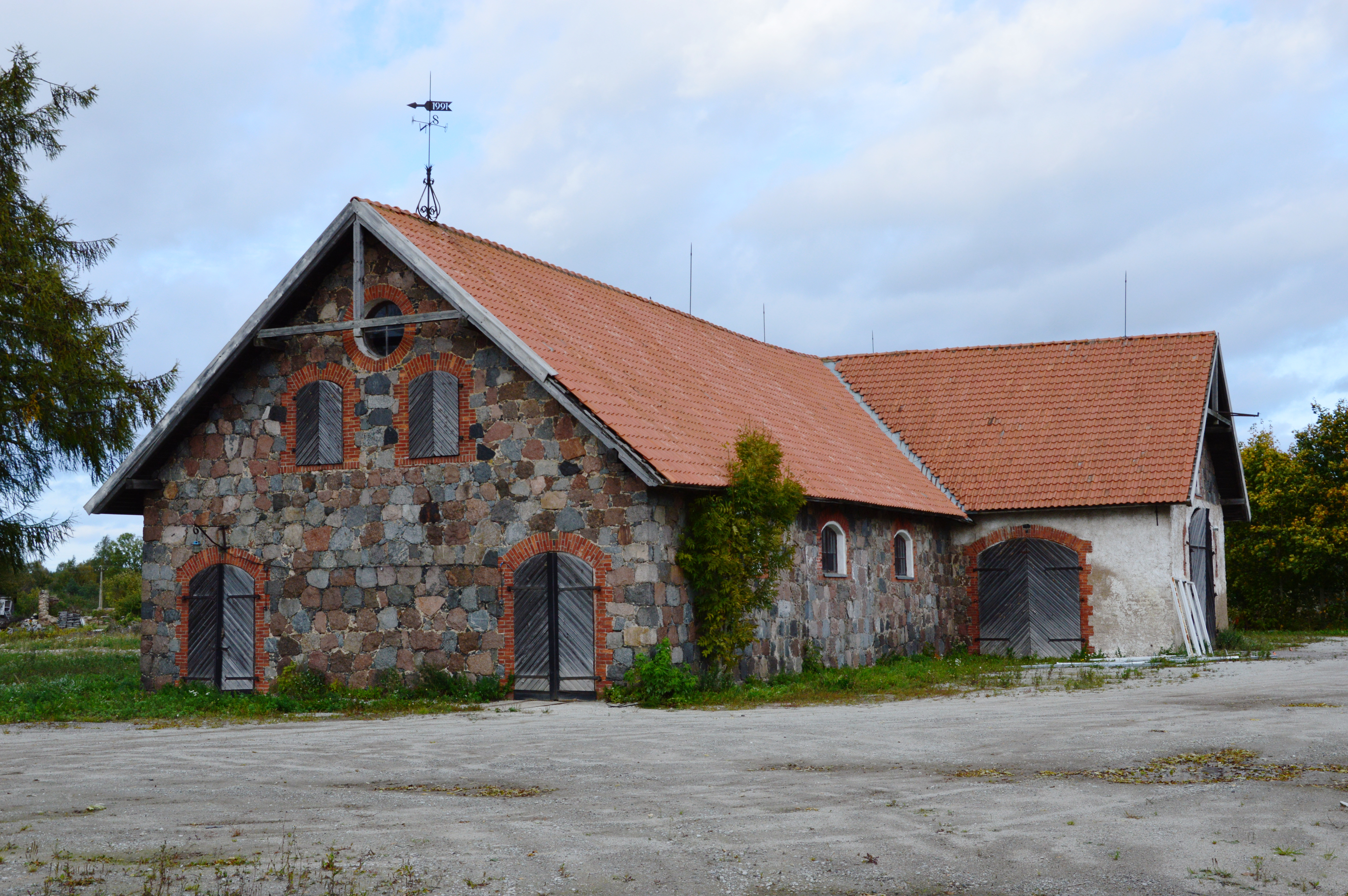 Kukruse mõisa hobusetall